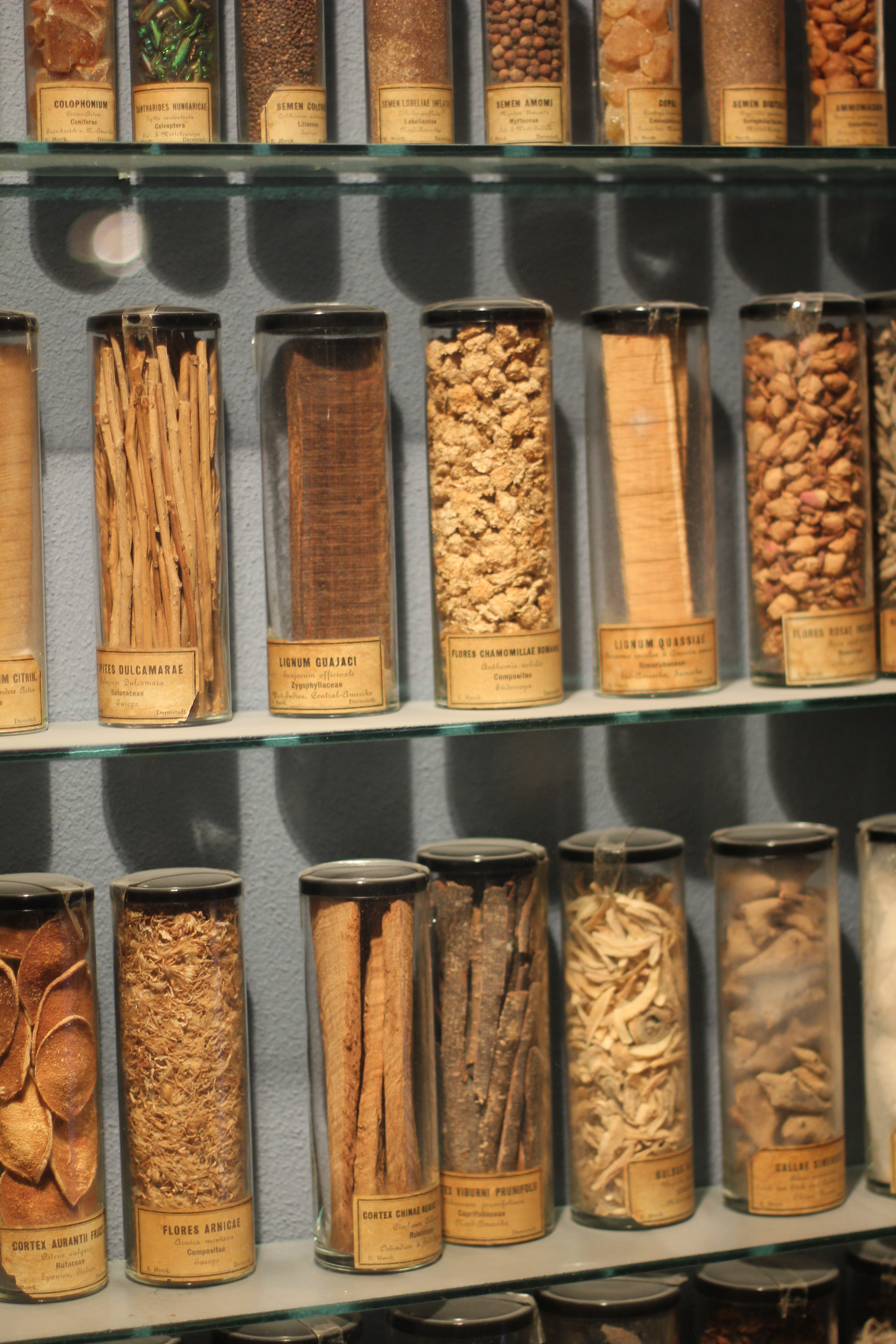 Et assortert utvalg urtemedisiner fra apoteket Ørnen ved Glomdalsmuseet.